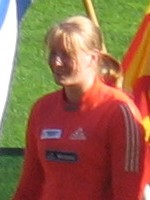 Johanna Pulkkinen Kalevan kisoissa, Ratinan stadionilla, Tampereella, 26. heinäkuuta 2008